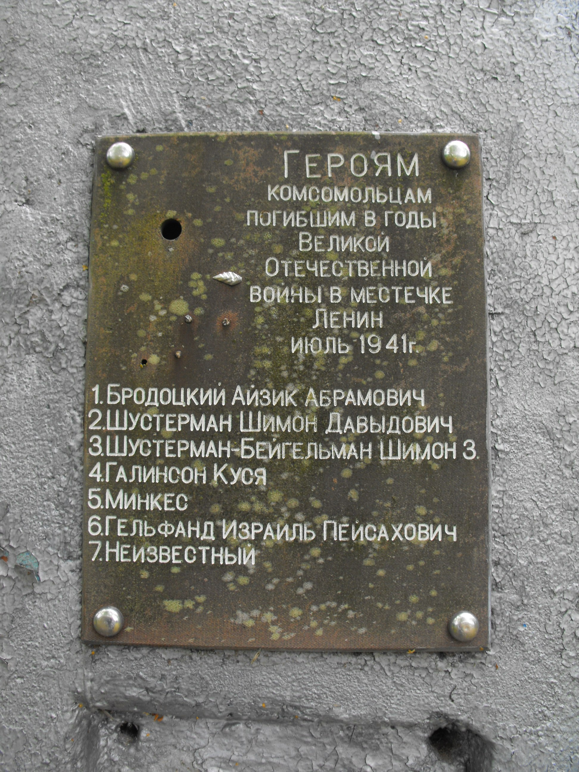 Памятник евреям деревни Ленин Житковичского района, убитым нацистами во время Второй мировой войны на территории еврейского кладбища.